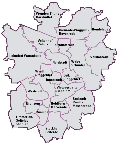 Die Stadtbezirke Braunschweigs mit Namen